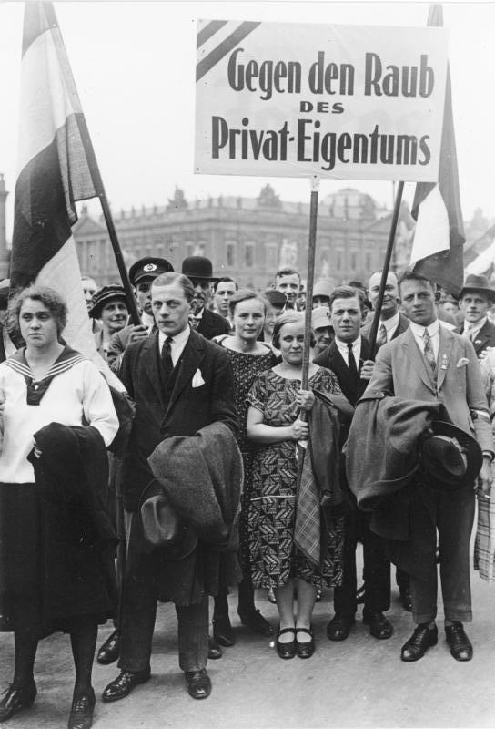 Große Protestkundgebung der Deutschnationalen gegen die Fürstenabfindung im Lustgarten in Berlin. Eine interessante Gruppe im Demonstrationszug